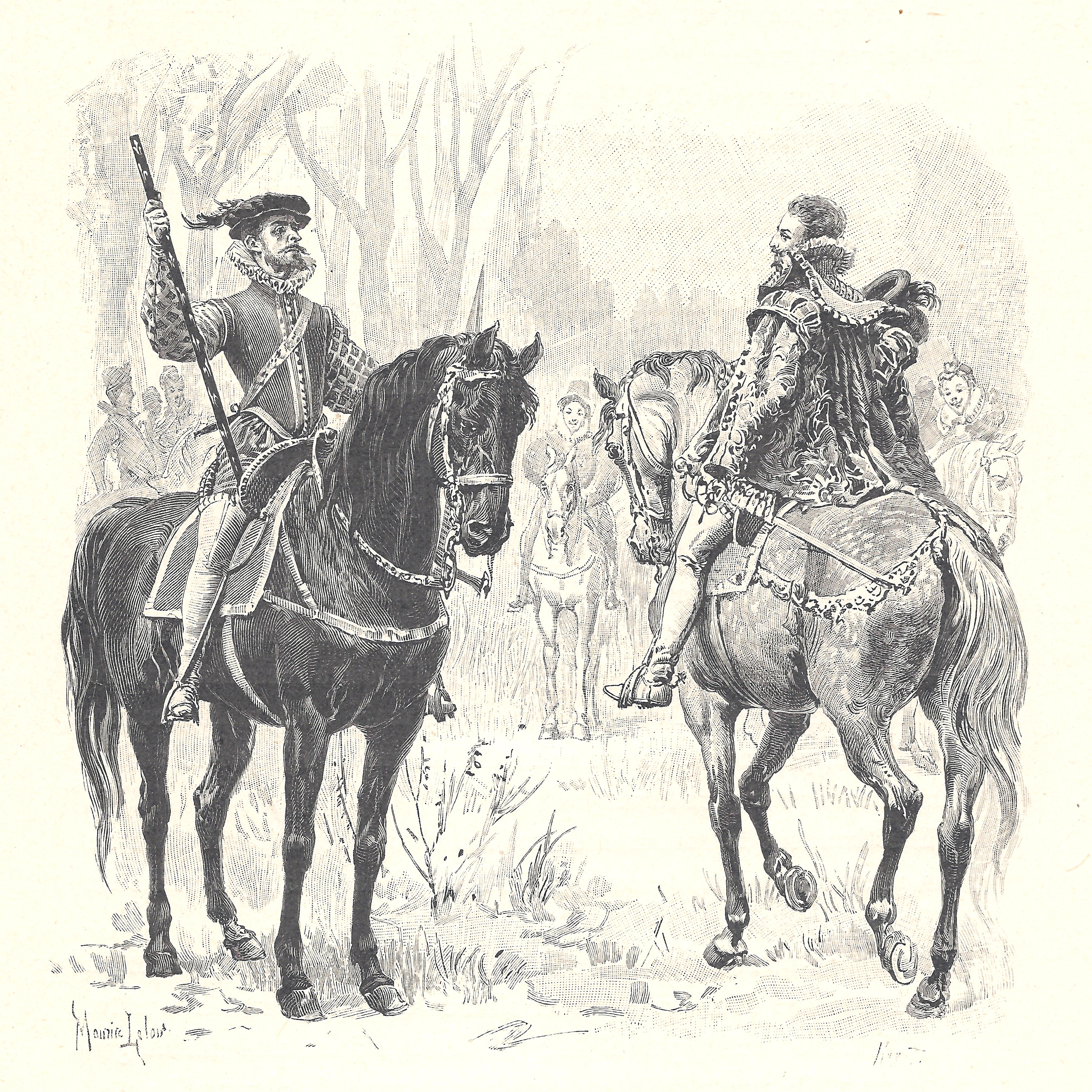 composition de Maurice Leloir et gravure sur bois de Jules Huyot se trouvant p. 123 : Et le chapeau à la main, Bussy s'approcha de Monsoreau.